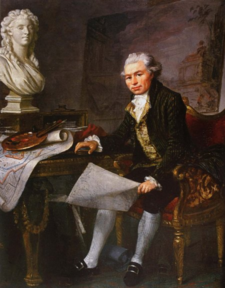 Maler unbekannt (von 1798)